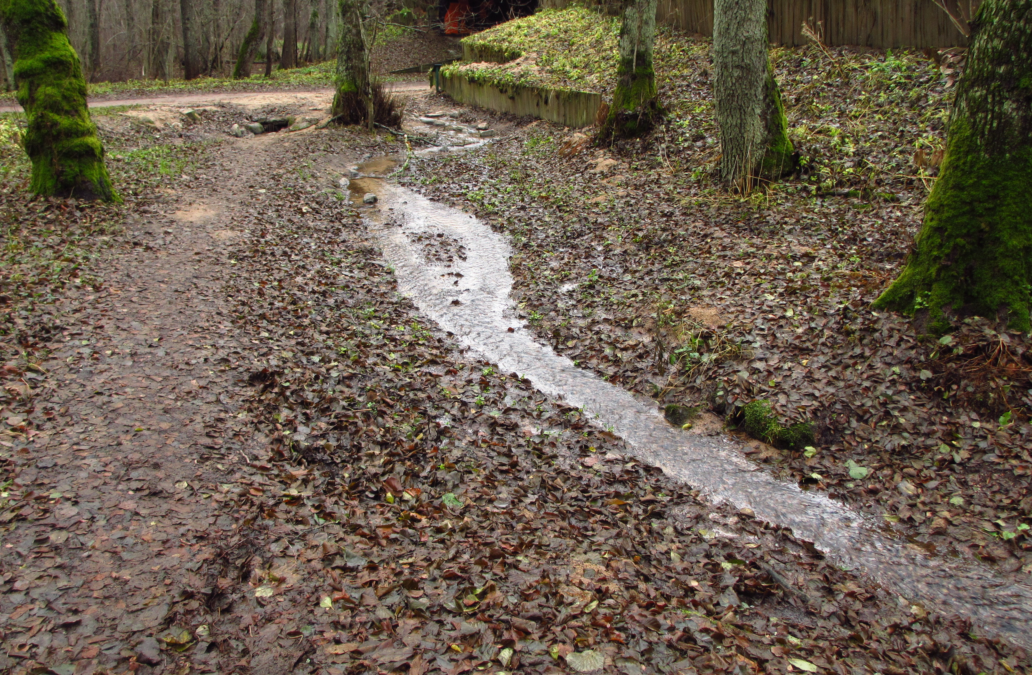 Glehni pargi allikad sh. Rõõmuallikas